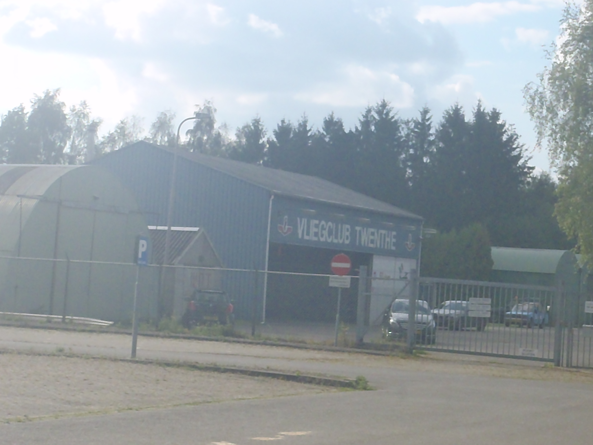 hanger vliegclub twente